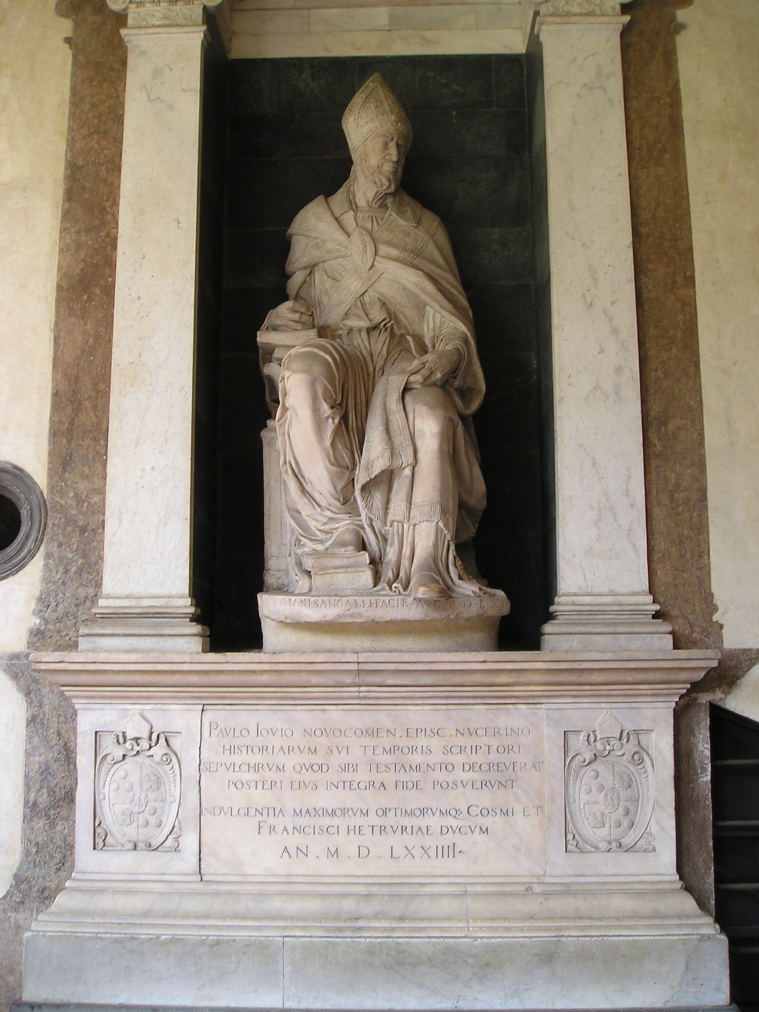 Paulus Giovius' statue in Laurenziana library in Florence